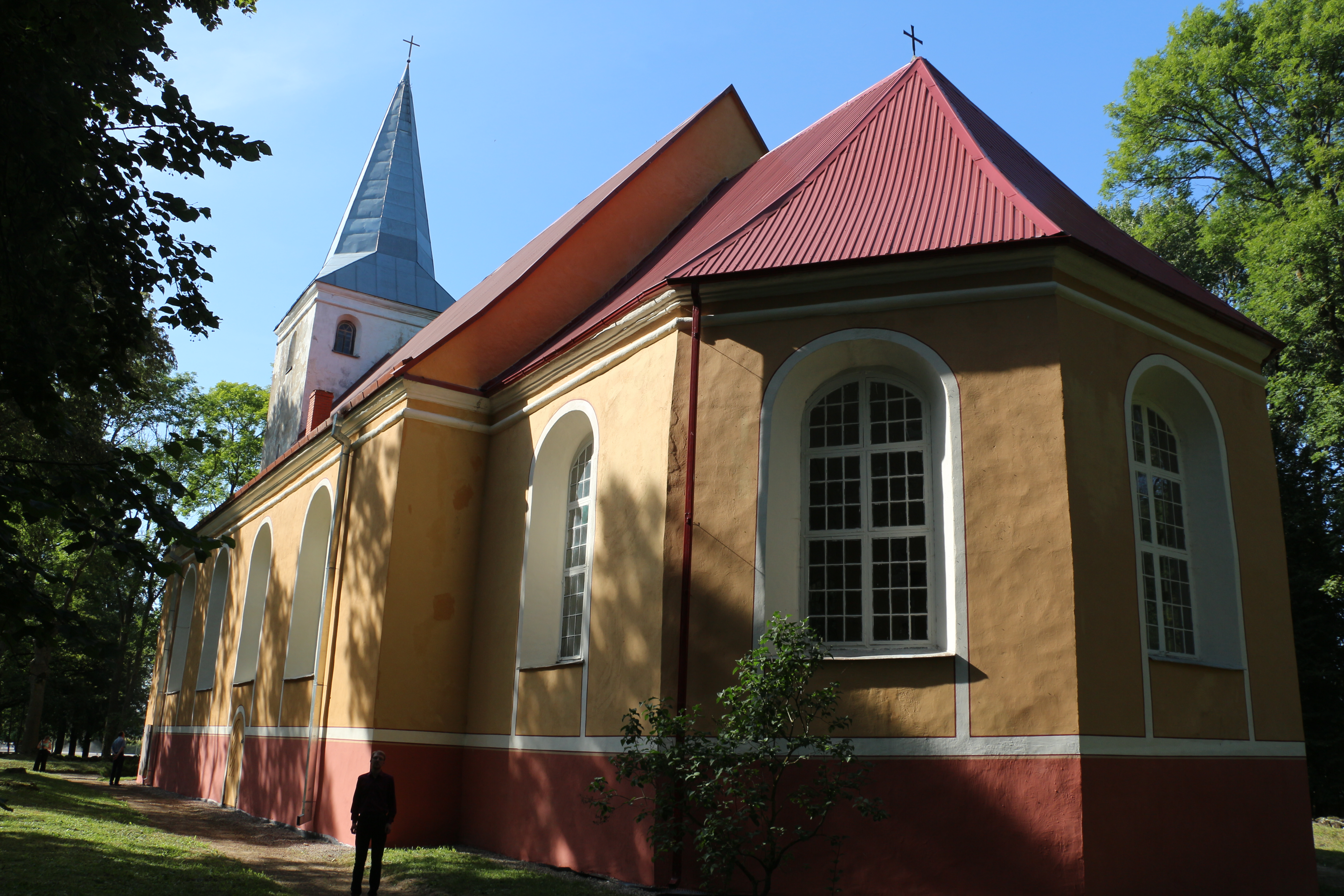 Mežmuižas luterāņu baznīca